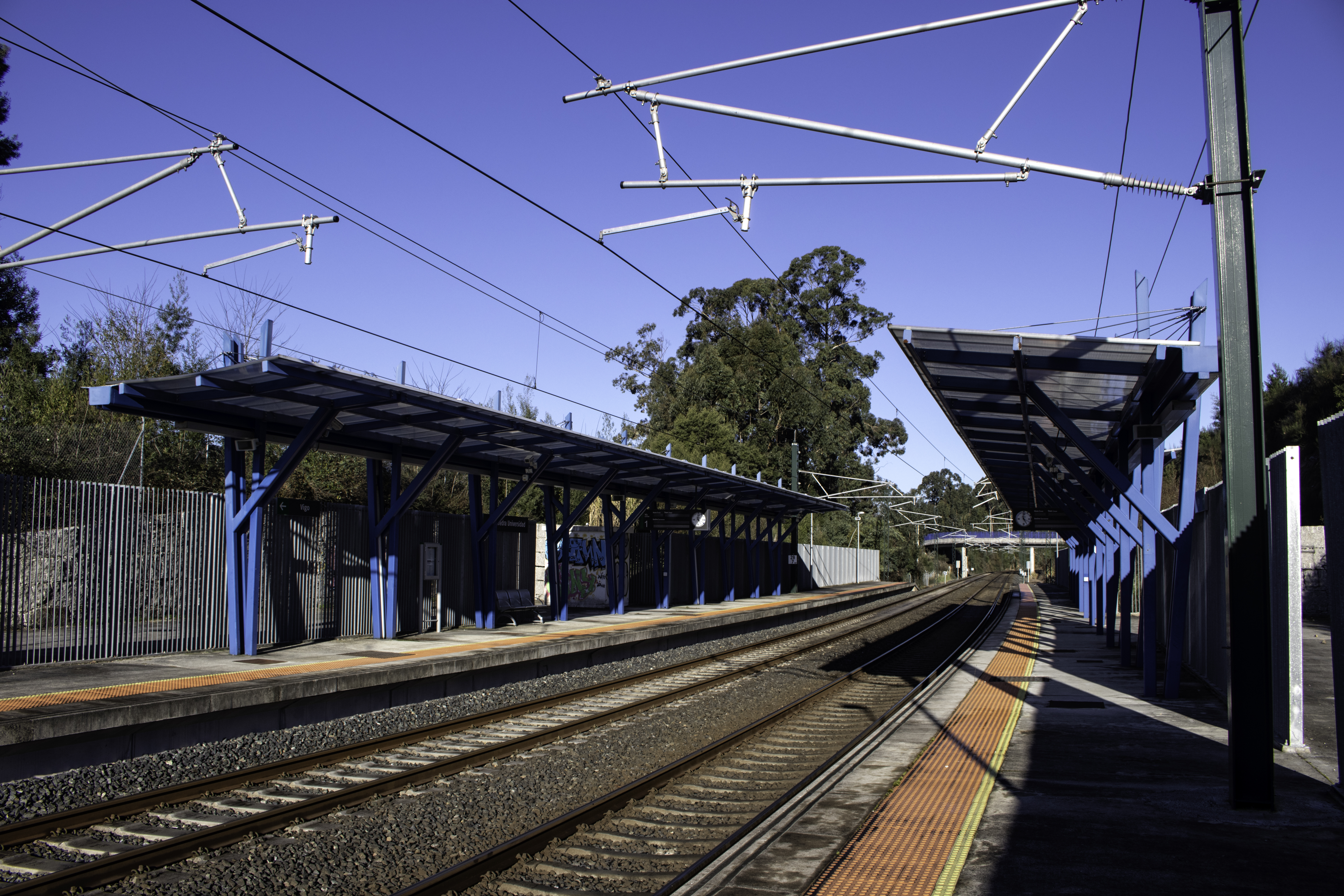 Apeadoiro de Pontevedra-Universidade.